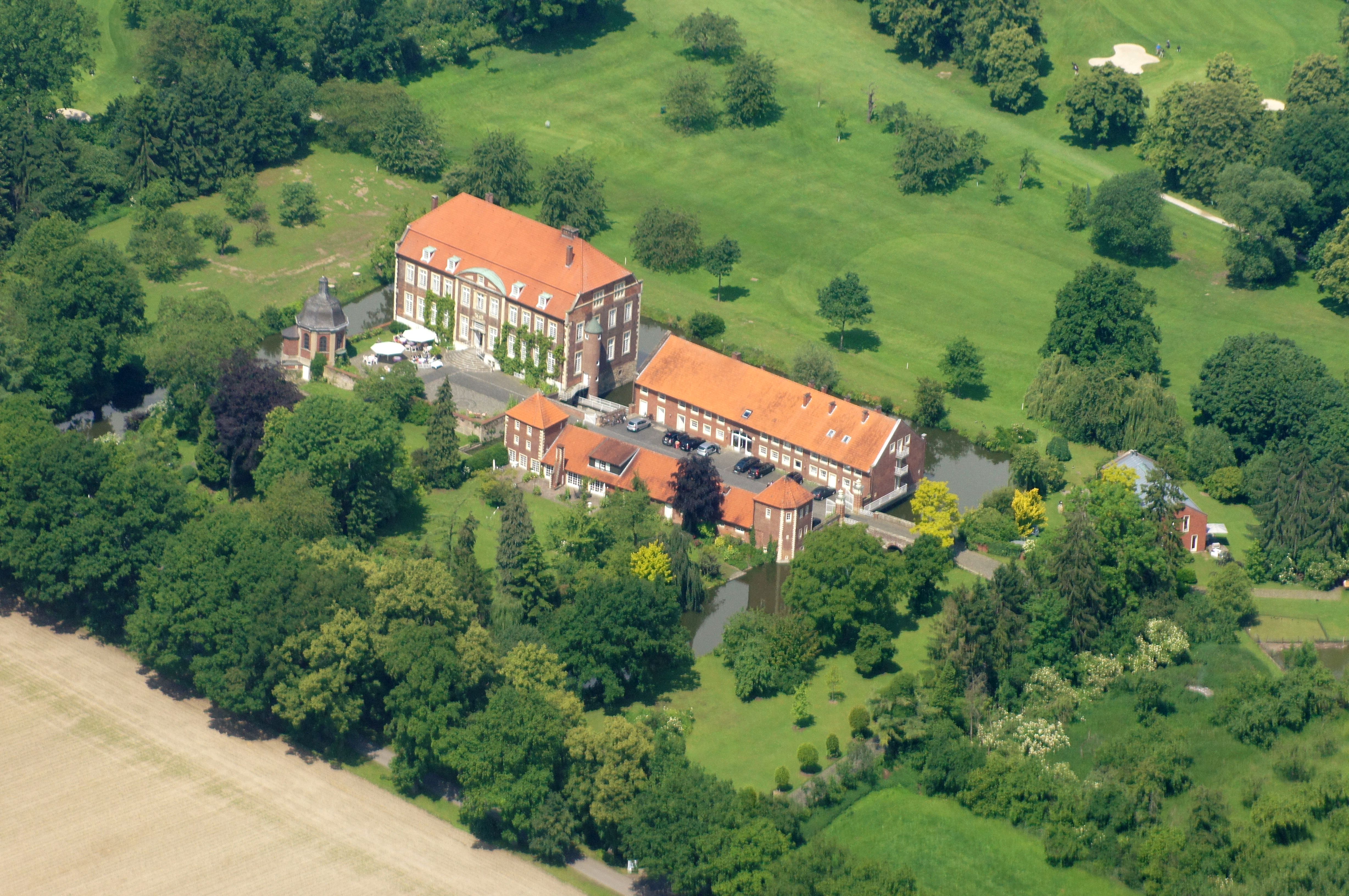 Schloss Wilkinghege ist ein Wasserschloss im Stadtteil Kinderhaus der westfälischen Stadt Münster, das im Stile der Spätrenaissance errichtet wurde. Die Aufnahme entstand während des Münsterland-Fotoflugs am 1. Juni 2014. Hinweis: Die Aufnahme wurde aus dem Flugzeug durch eine Glasscheibe hindurch fotografiert.